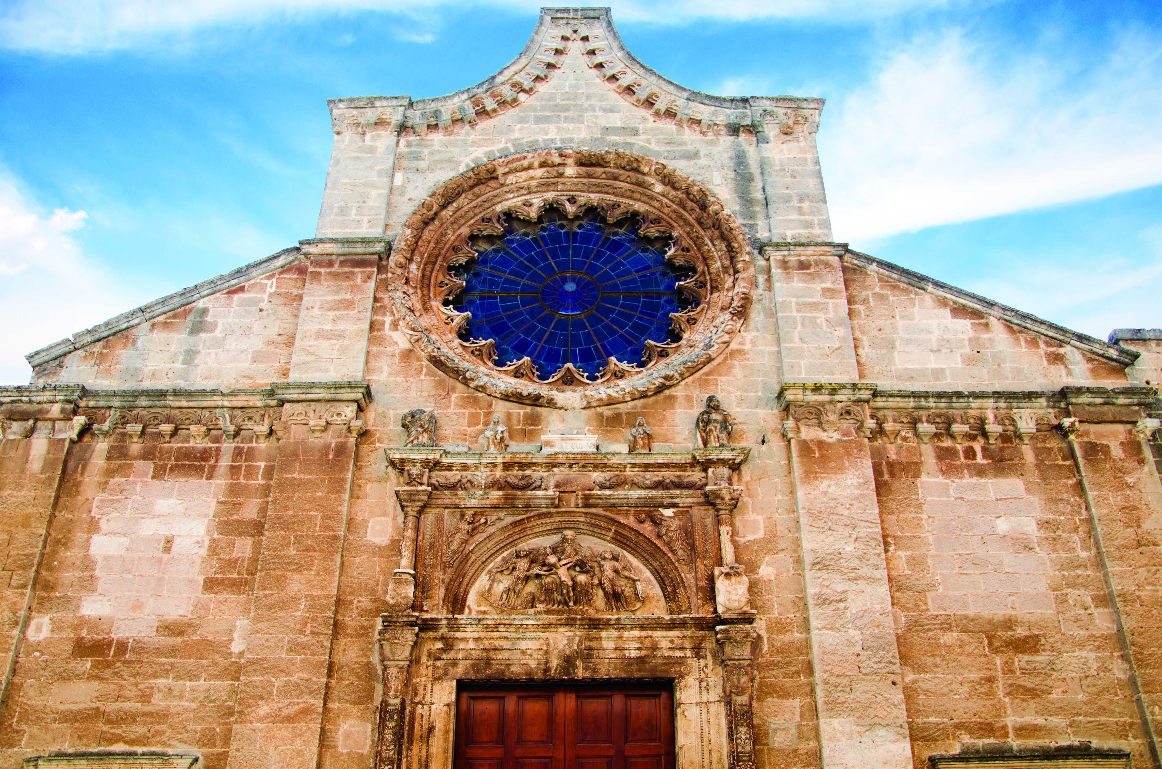 portale chiesa matrice This is a photo of a monument which is part of cultural heritage of Italy.